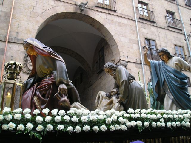 Paso del Santo Entierro, Francisco González Macías, Semana Santa en Salamanca.